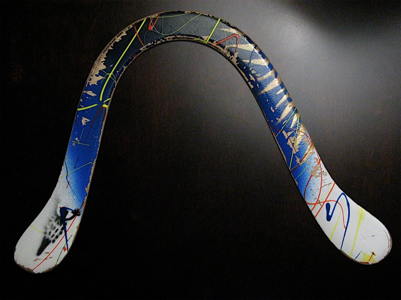 Delicate Arch Boomerang